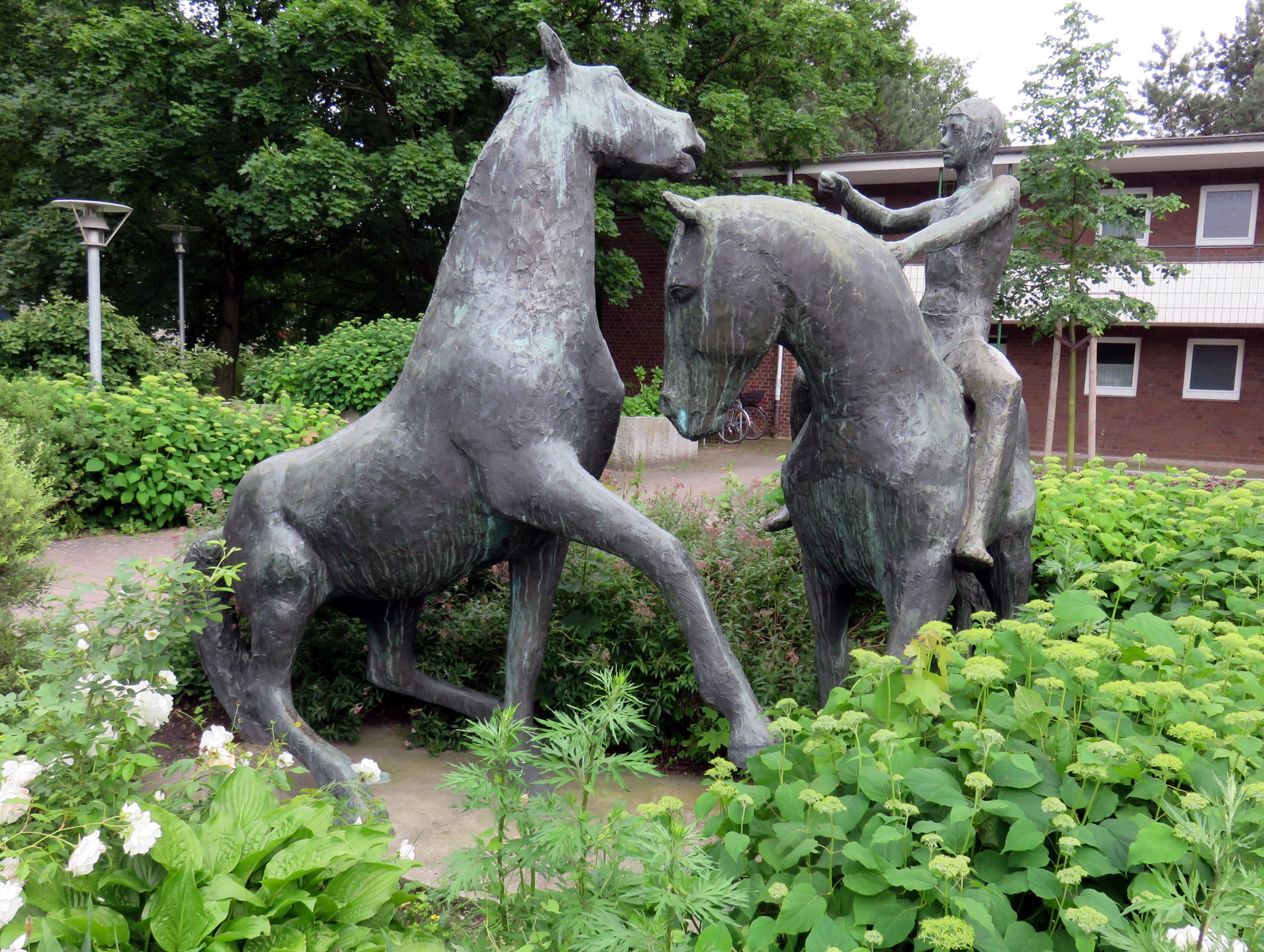 Bronzeskulptur “Reiter mit zwei Pferden” des deutschen Bildhauers Martin Irwahn von 1968, Wagrierweg 31, Hamburg-Niendorf.